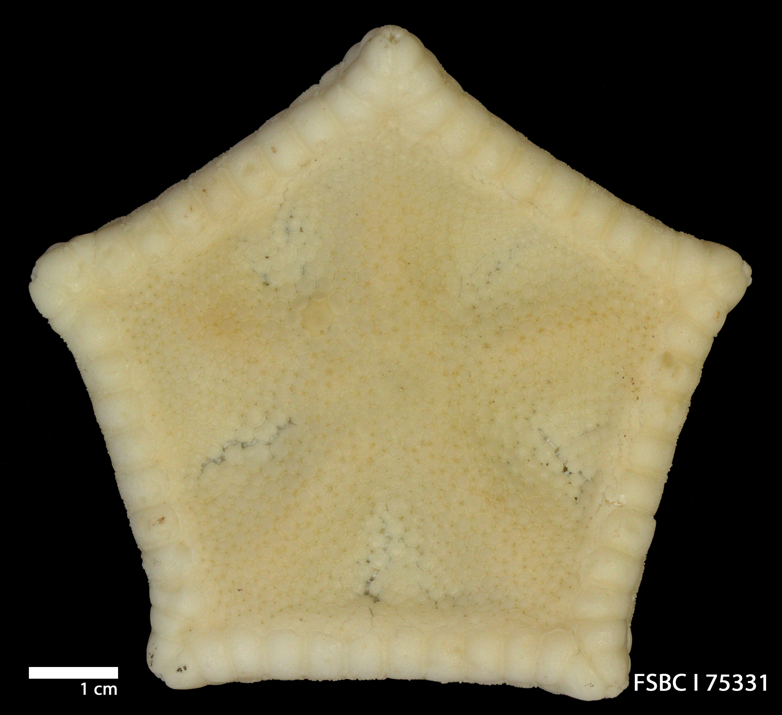 Scientific name: Peltaster placenta